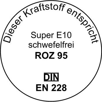 Zapfsäulenaufkleber für Super E10 schwefelfrei gemäß 10. BImSchV; BGBl. I 2014, 1894